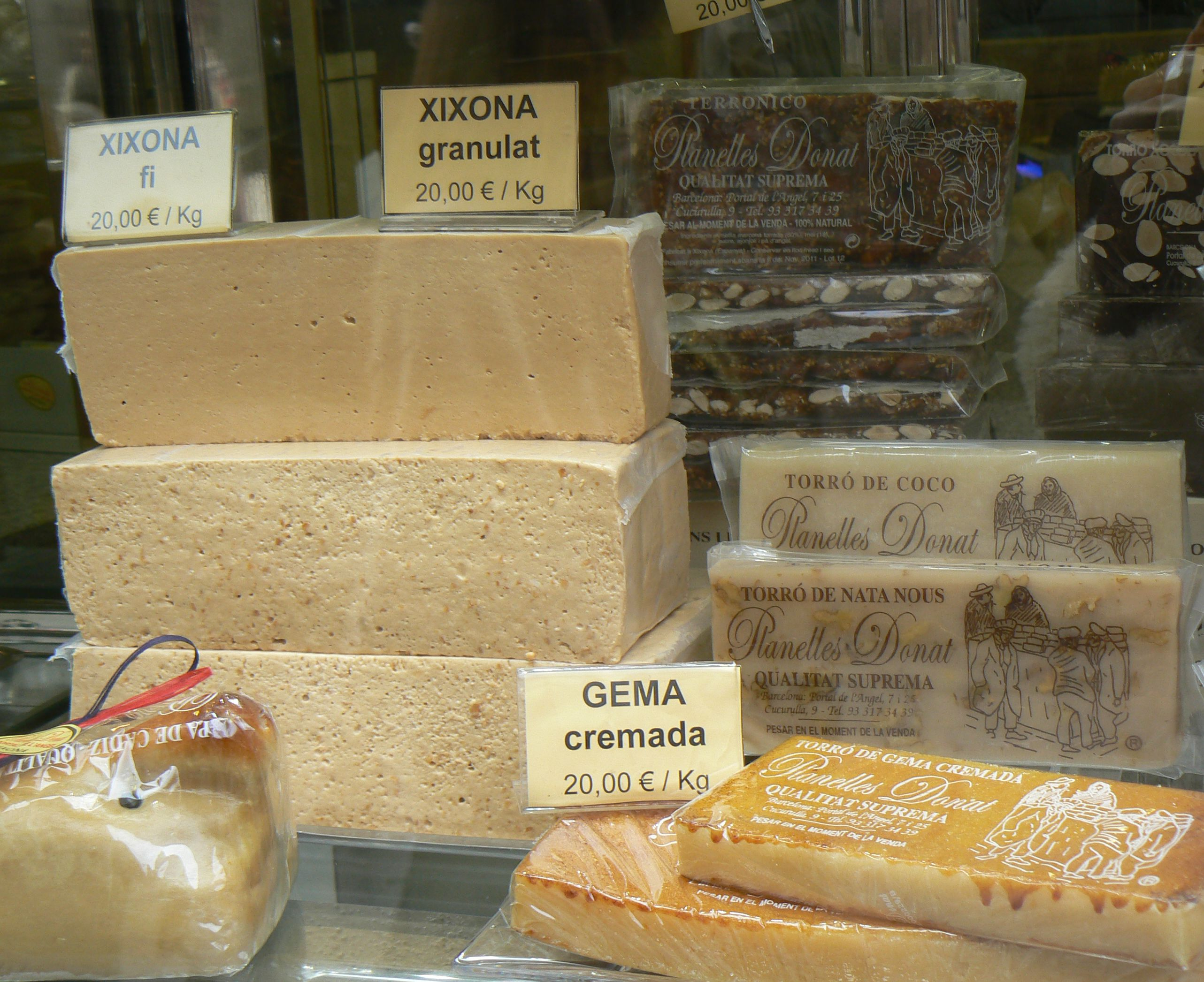 Torrons assortits: tou, de crema cremada, de nata i nous, etc.